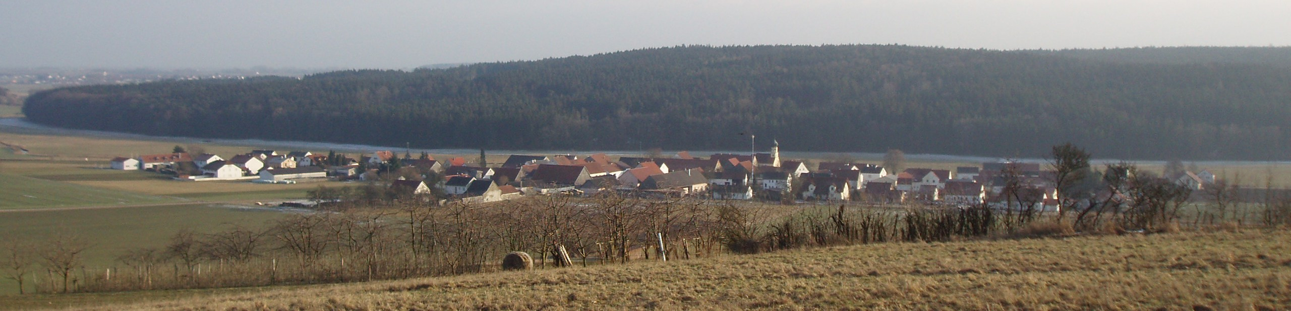 Meilenhofen im Landkreis Eichstätt